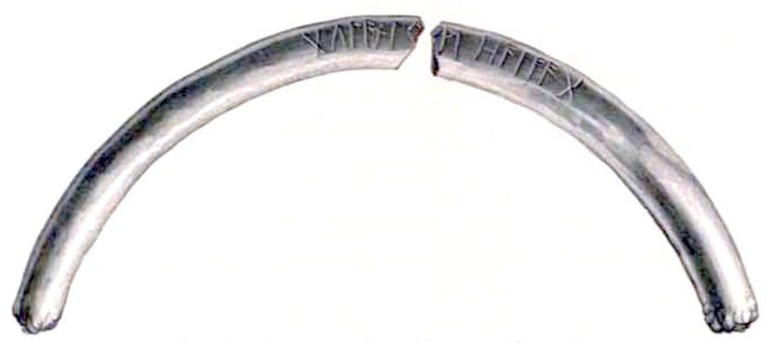 Două fragmente dintr-un colier inelar de 314.15 grame de aur, lucrat din bară de secțiune circulară; inscripție gravată în alfabet runic pe ambele fragmente - Fragmentele de colan cu inscripție runică care au rămas ca urmare a furtului lui Pantazescu din anul 1875. Restul colanului a fost topit de argintarul Costache Constantinescu care a tăiat bucata rămasă în zona inscripției runice.